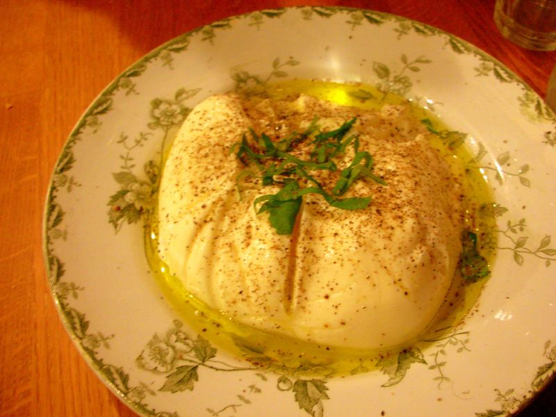 Burrata di Corato à l'huile d'olives de la vallée des Baux de Provence Soft cheese, similar to mozerella, swimming in a very grassy olive oil (La Cremerie/Caves Miard)